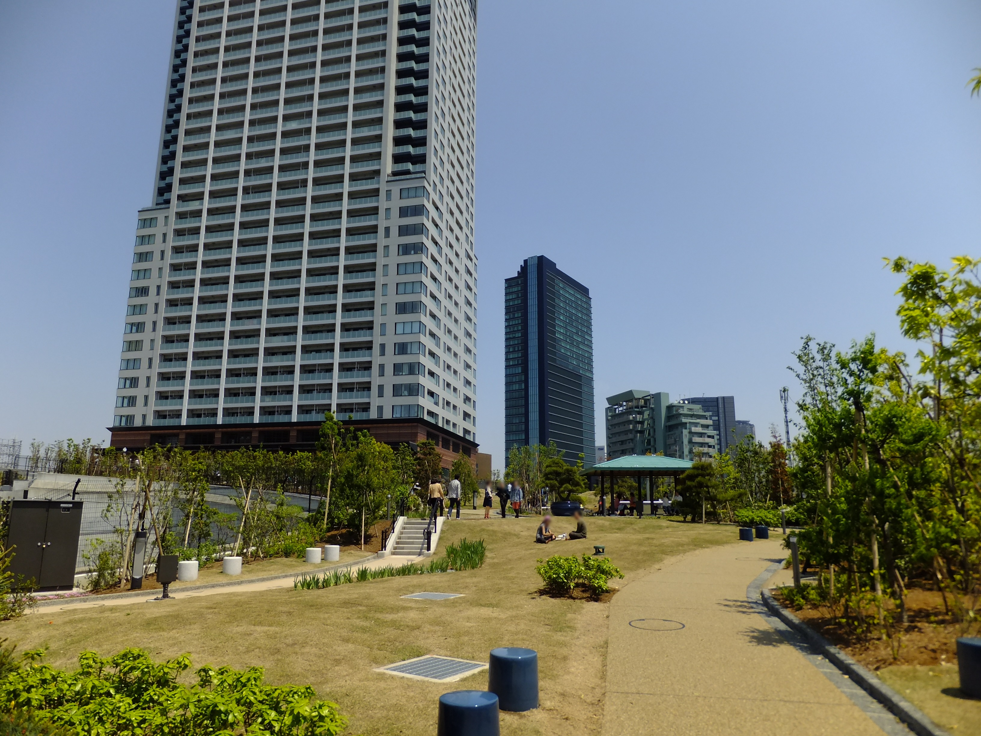 目黒天空庭園。クロスエアタワー方向